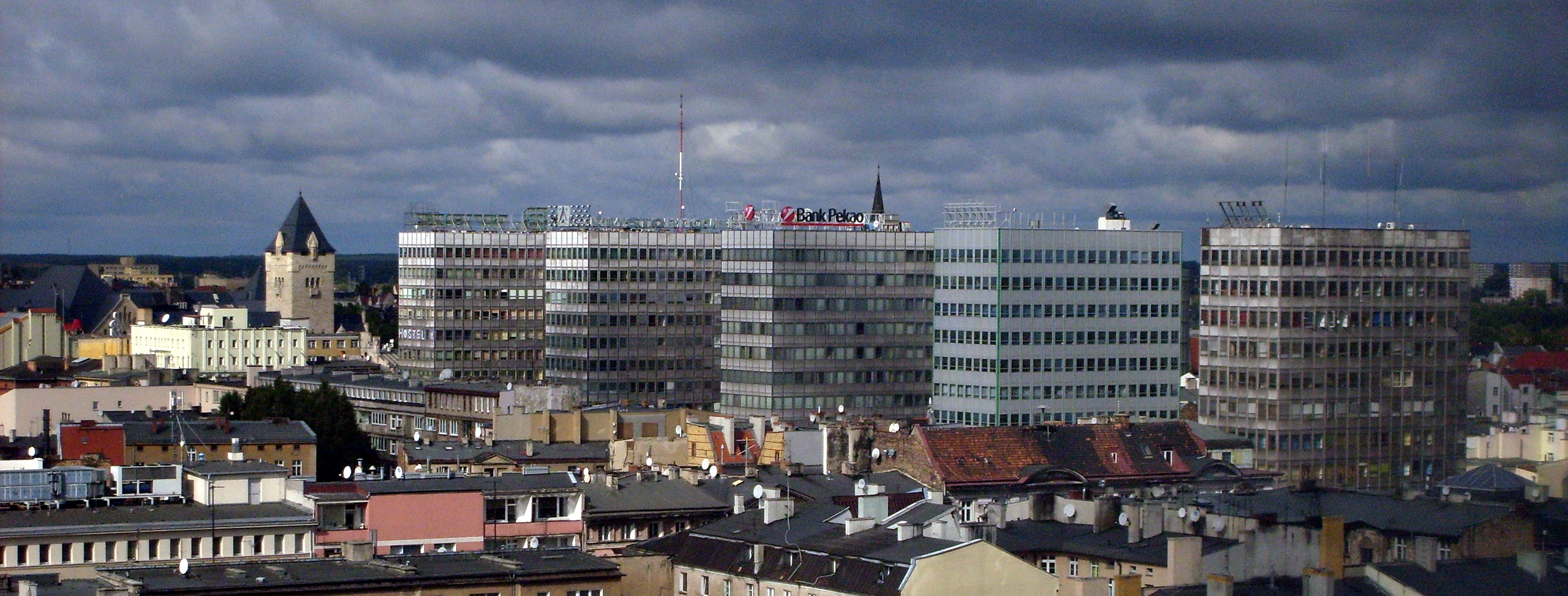 Poznań, św. Marcin, Domy Towarowe Alfa